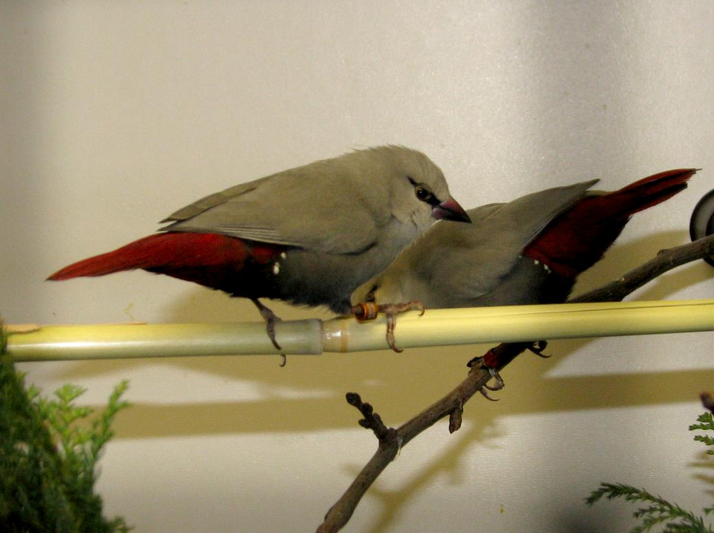 Schönbürzel (Estrilda caerulescens), fotografiert auf der Vogelausstellung 2011 Bochum